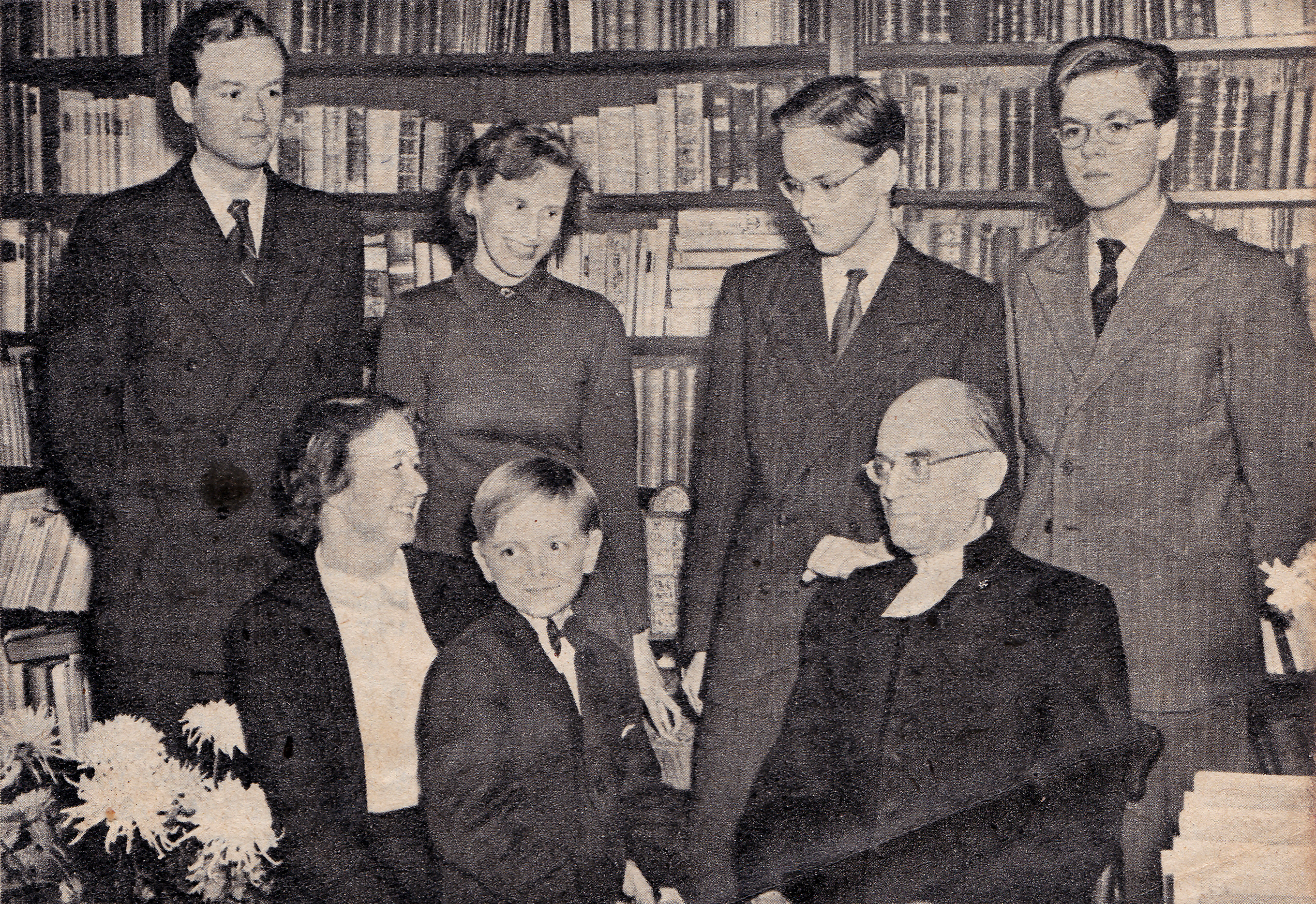 Biskopfamiljen Helander.